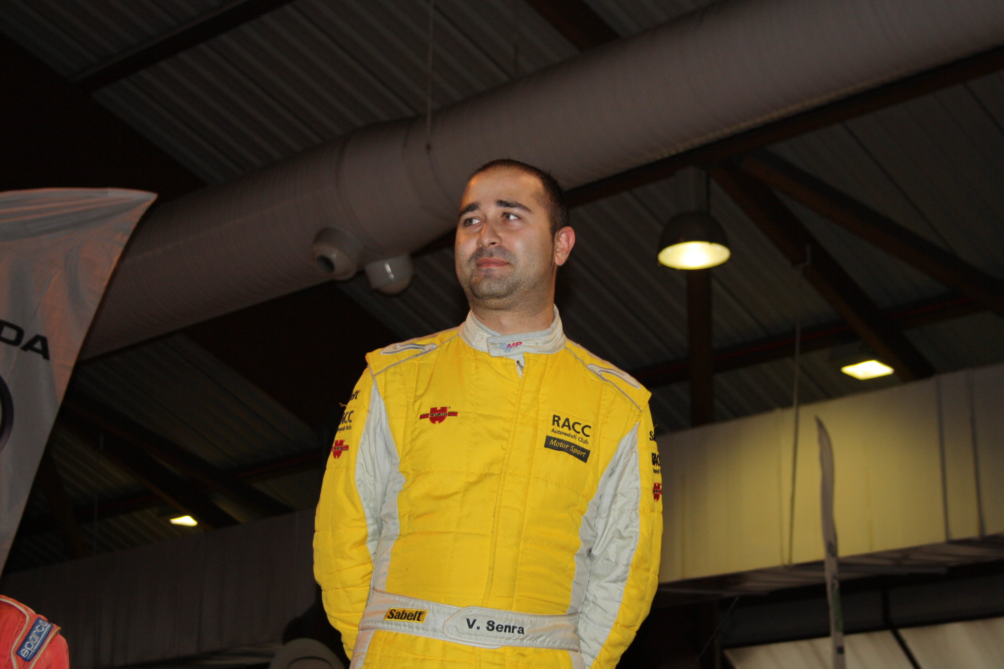 1º Master de Campeones de Galicia. Recinto Ferial de Amio. Año 2012